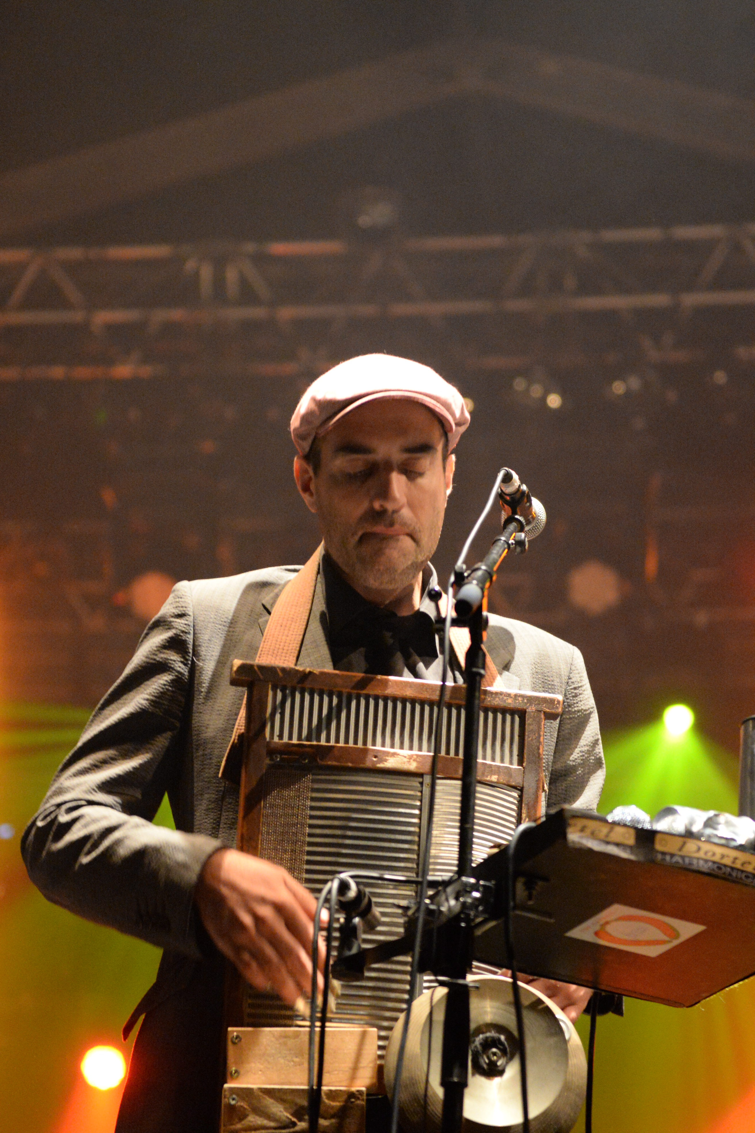 Concert de Red Cardell du 8 août 2014 au Festival Interceltique de Lorient 2014